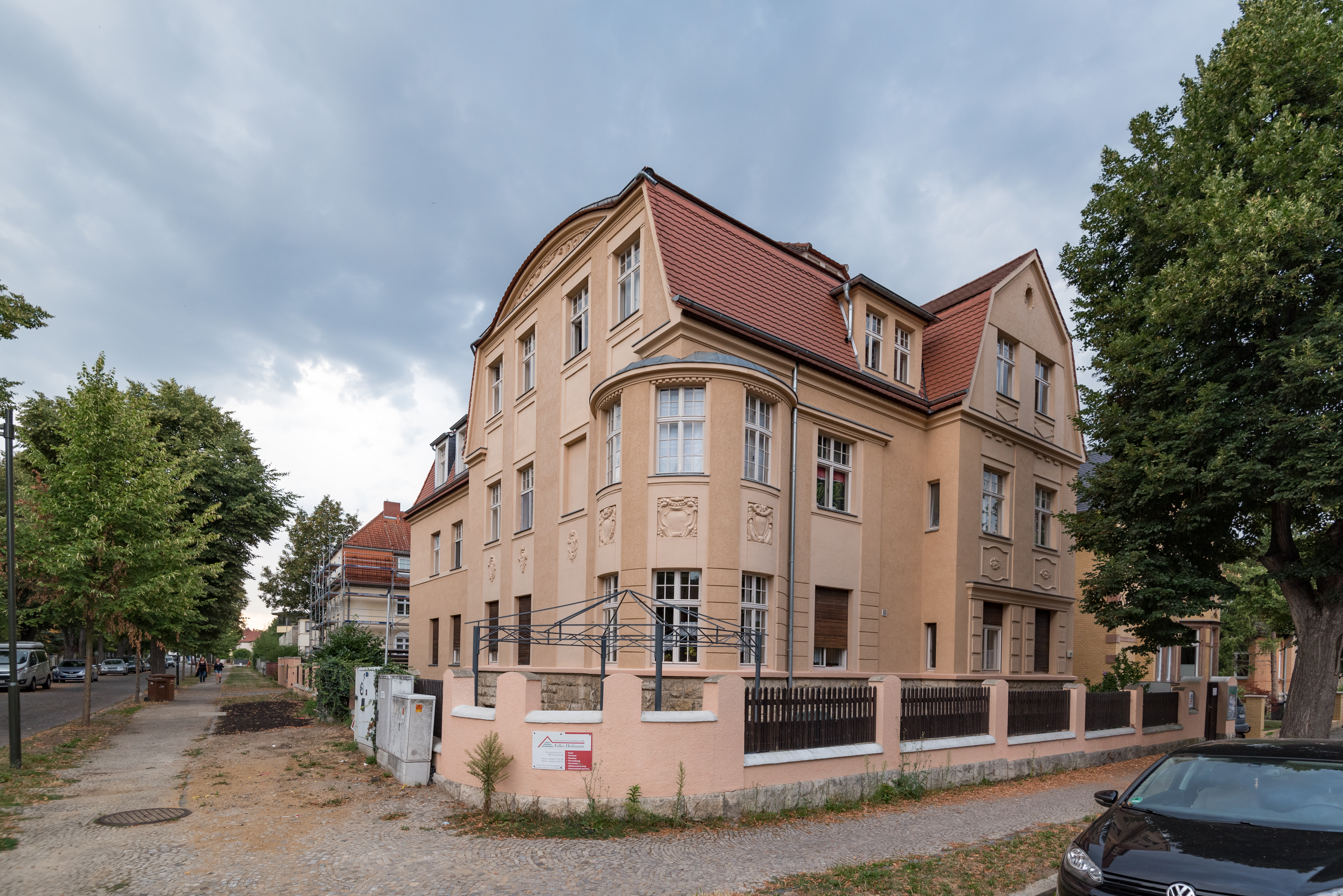 Naumburg (Saale), Buchholzstraße 41